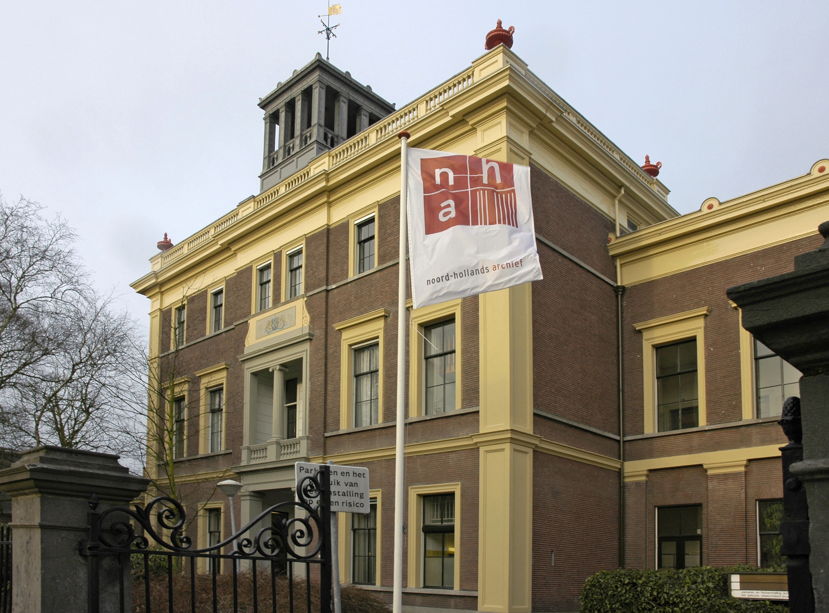 Kleine Houtweg 18 te Haarlem, tegenwoordig is hier het Noord-Hollands Archief gevestigd. Daarvoor zat het Gewestelijk Arbeidsbureau in dit gebouw, wat oorspronkelijk was gebouwd als Doopsgezind Weeshuis.